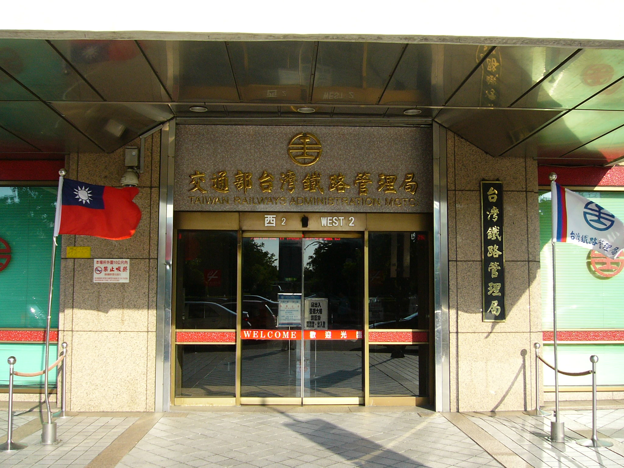 中文（台灣）: 臺北車站西2門可通往臺灣鐵路管理局總局。 Bân-lâm-gú: Tâi-pak Tshia-tsām ê se jī mn̂g ē-sái thàng khì Tâi-uân Thih-lōo Kuán-lí-kio̍k ê tsóng-kio̍k. 臺北車站的西二門會使迵去臺灣鐵路管理局的總局。